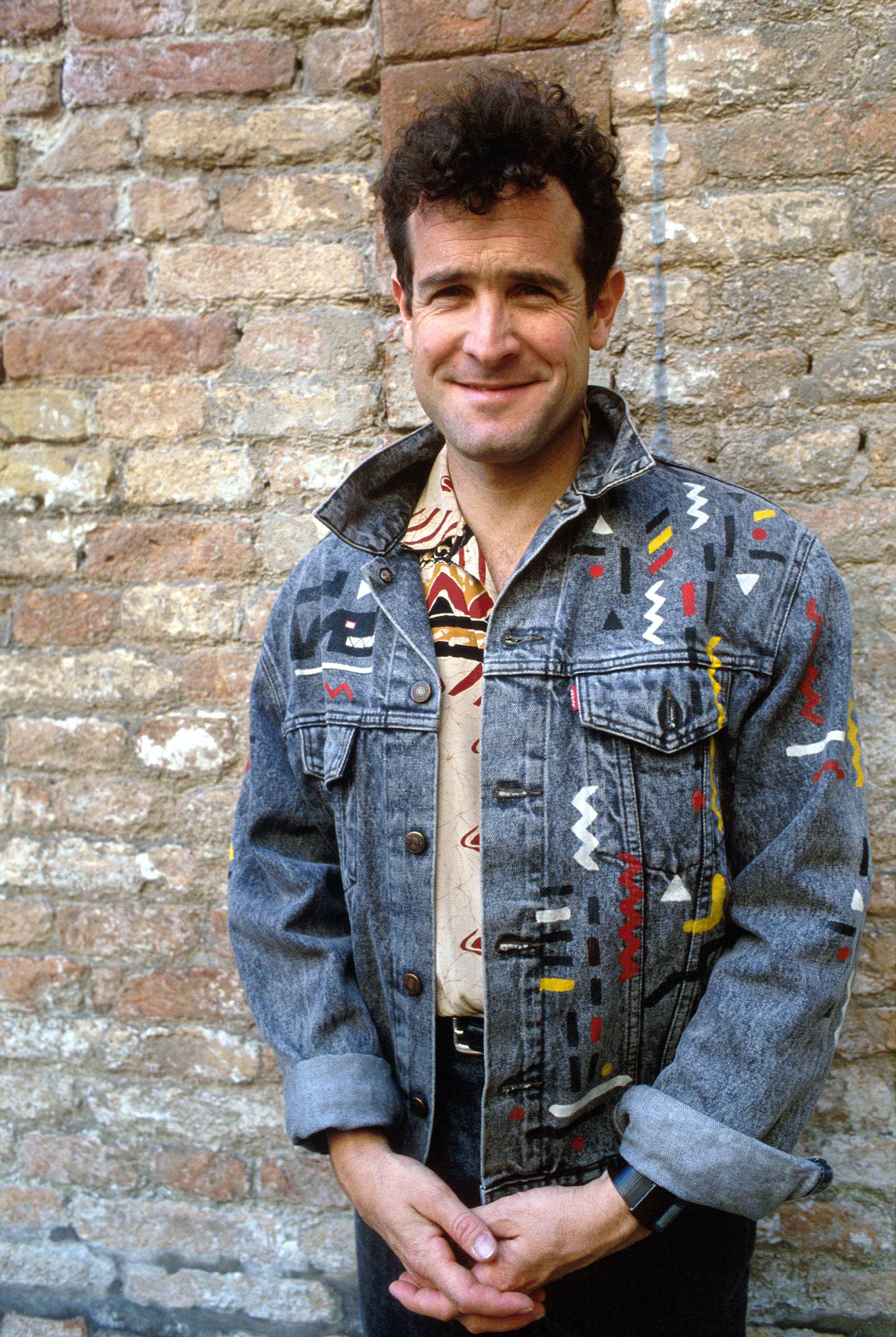 Il musicista sudafricano Johnny Clegg